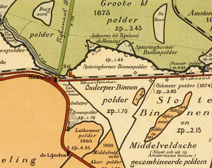 Osdorperpolders